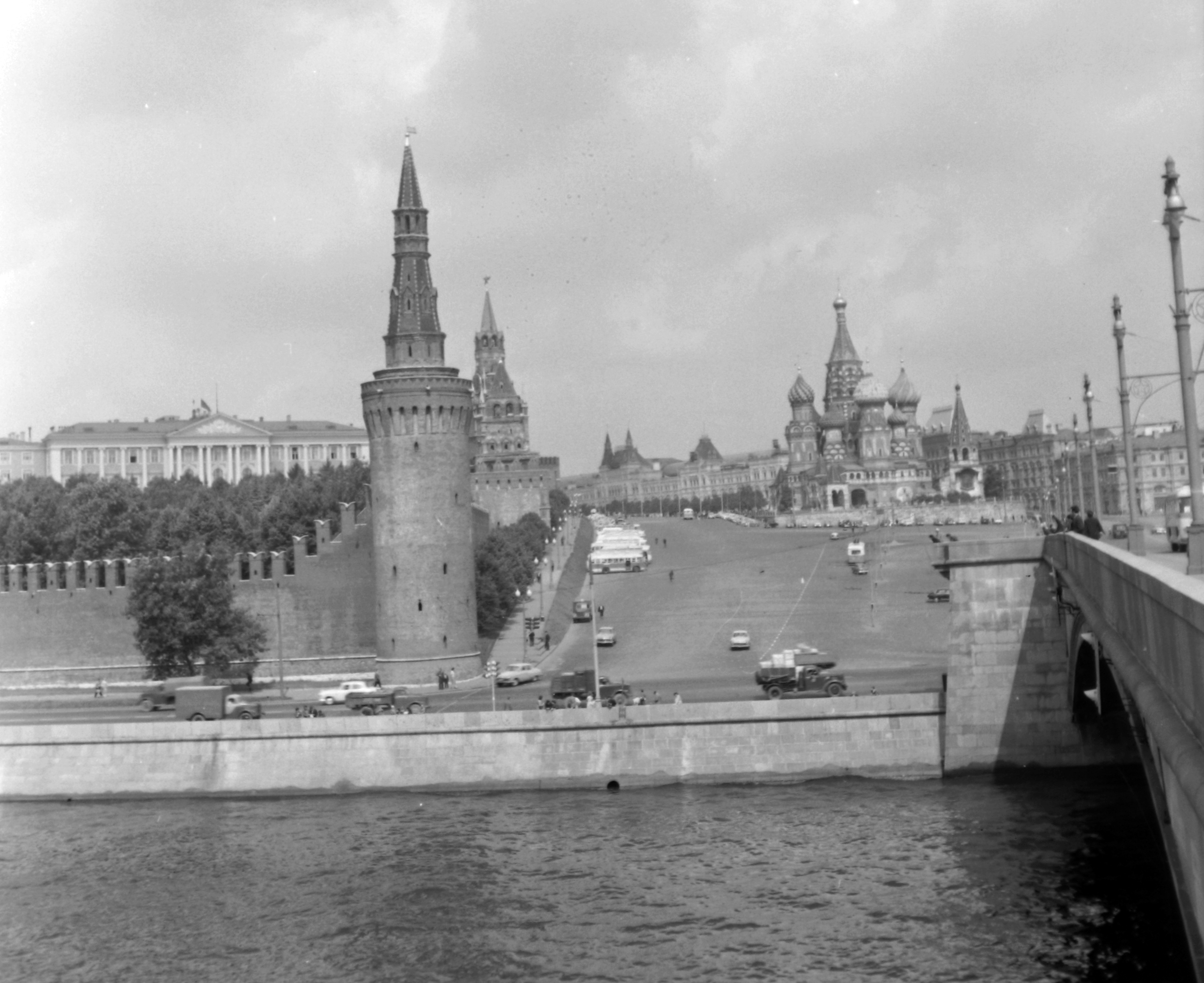 a Vörös tér, a Kreml és a Vaszilij Blazsennij székesegyház a Nagy Moszkva -folyó hídról nézve. Location: Russia, Moscow Tags: Soviet Union Title: a Vörös tér, a Kreml és a Vaszilij Blazsennij székesegyház a Nagy Moszkva -folyó hídról nézve.